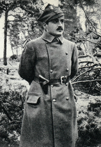 Józef Englicht, okres legionowy. Później podpułkownik WP i oficer wywiadu.